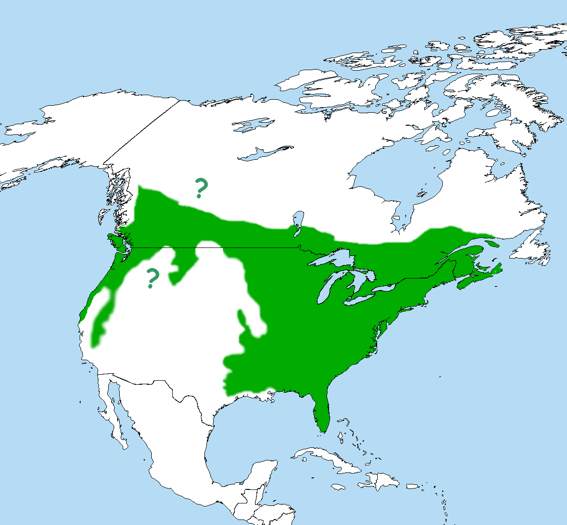 Verbreitungsgebiet des Helmspechts.